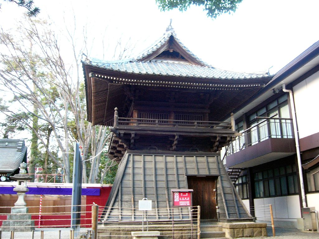 東京都府中市武蔵国総社大國魂神社鼓楼（慶長） 府中市指定文化財 市重宝